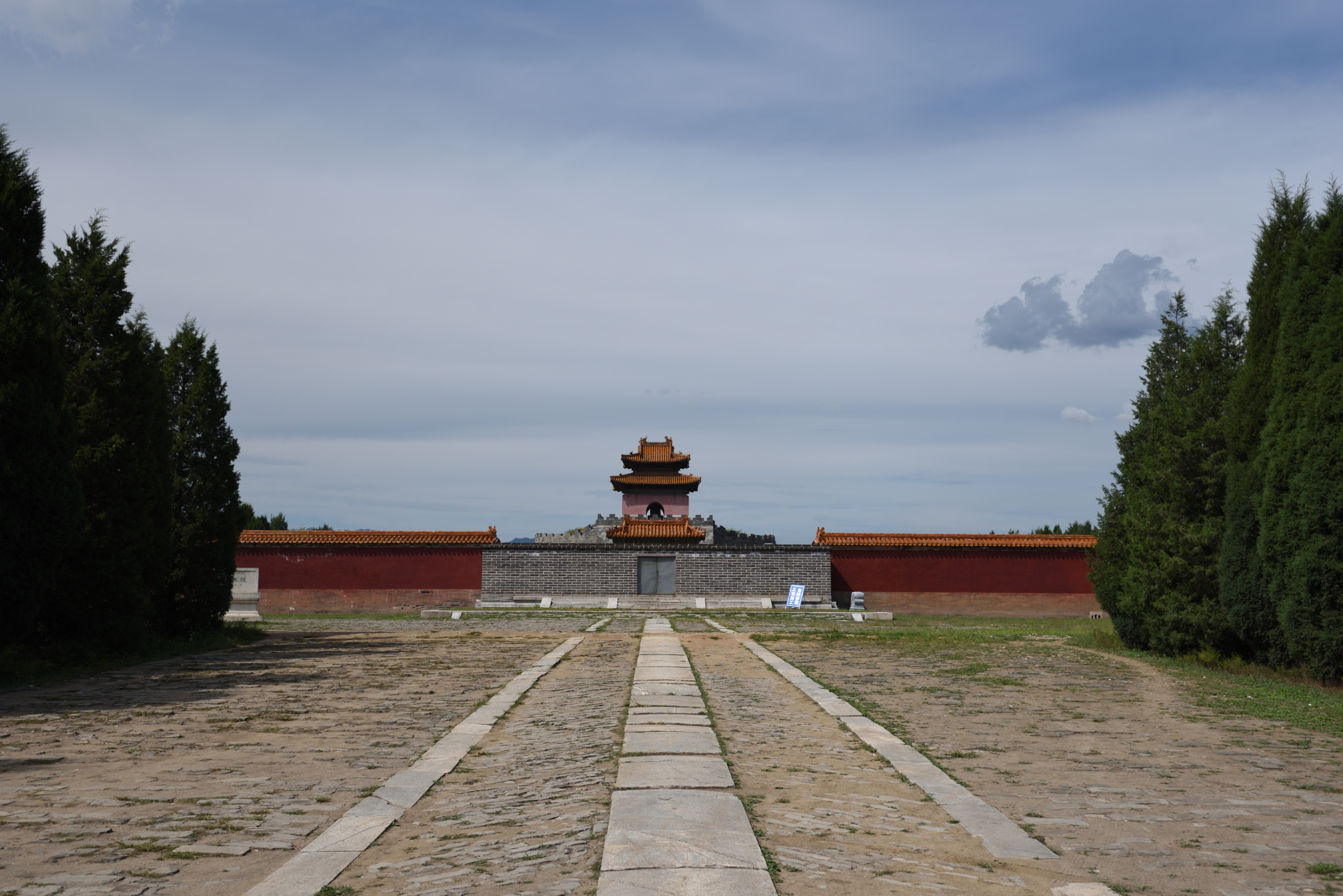 清昭西陵遗址